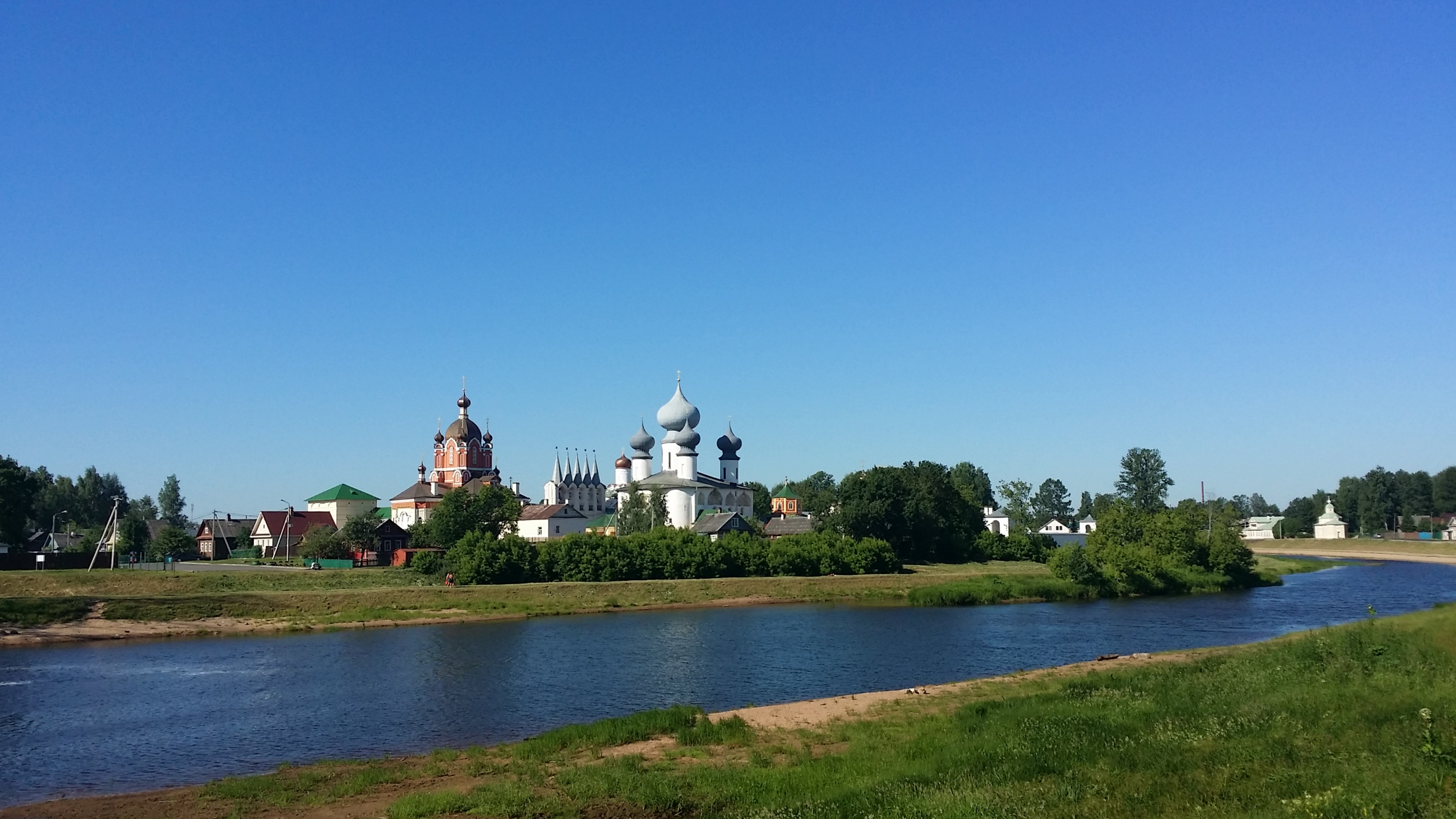 Ансамбль Большого Успенского Тихвинского монастыря: улица Советская, 64 / улица Тихвинская, 6-11, Тихвин, Тихвинский район, Ленинградская область